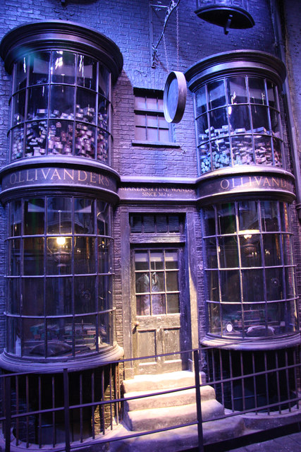 Ollivanders wand shop in Diagon Alley. Makers of fine wands since 382 BC. One of the highlights of the Warner Brothers Studio Tour.